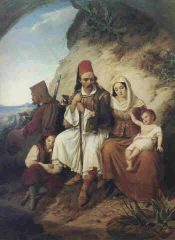 Konstantin Johannes Franz Cretius: Griechische Familie auf der Rast, 1836 Medium oil on canvasmedium QS:P186,Q296955;P186,Q12321255,P518,Q861259 Größe 76,4 x 56,7 in. / Height: 194 cm (76.3 ″); Width: 144 cm (56.6 ″) dimensions QS:P2048,194U174728;P2049,144U174728 Bez. Signed Verkauft durch Sotheby's Munich: Montag, 23.Juni 1997